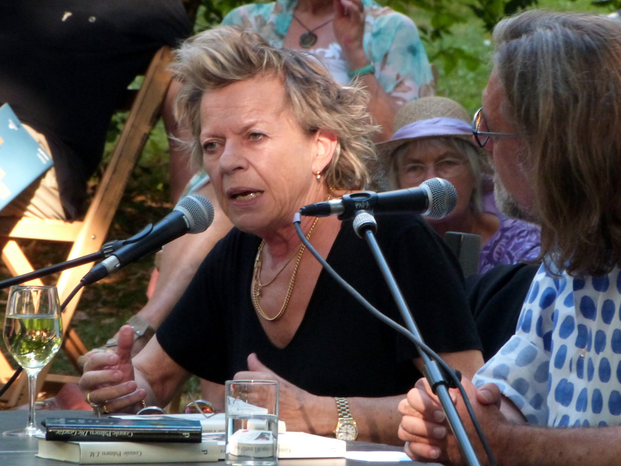 Die Schriftstellerin Connie Palmen im Interview mit Dirk Kruse auf dem Erlanger Poetenfest 2016.